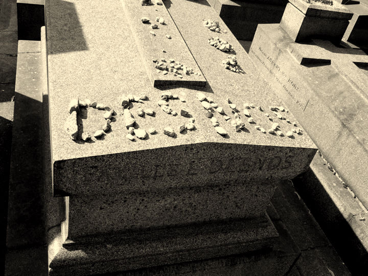 Le brochet Fait des projets. J'irai voir, dit-il Le Gange et le Nil, Le Tage et le Tibre Et le Yang-Tsé-Kiang. J'irai, je suis libre D'user de mon temps Et la lune ? Iras-tu voir la lune ? Brochet voyageur, Brochet mauvais coeur, Brochet de fortune. (Chantefables et chantefleurs)